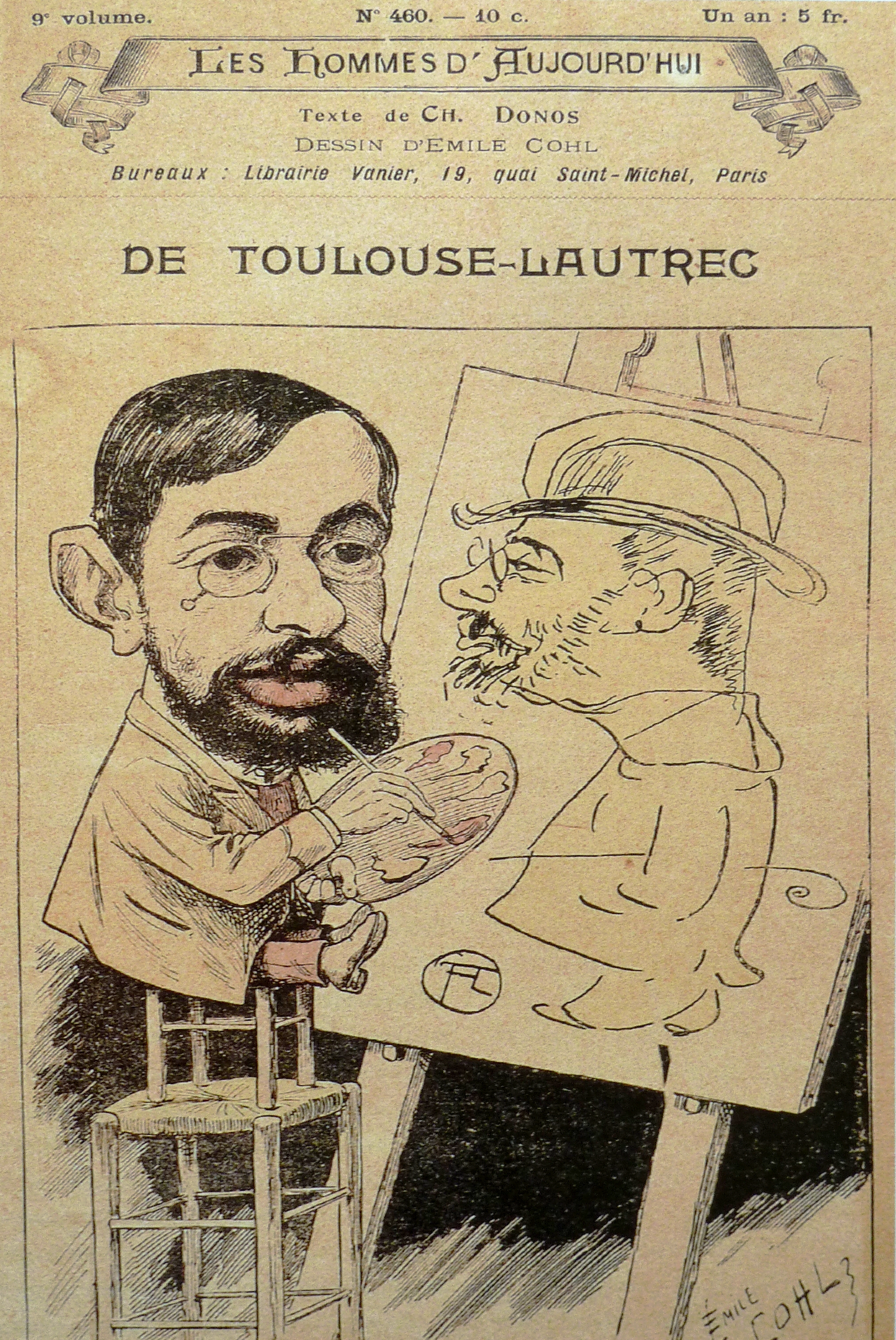 Caricature d'Henri de Toulouse-Lautrec par Émile Cohl. Les Hommes d'Aujourd'hui n°460, 1898.